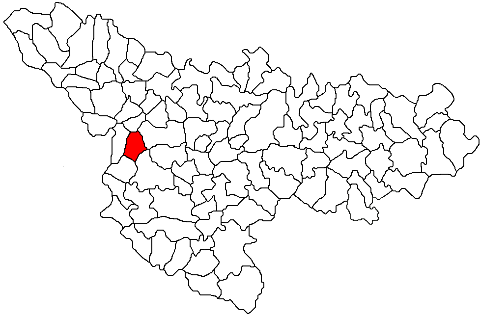 Cenei, Timis Licensing Categorie:Hărţi ale judeţului Timiş